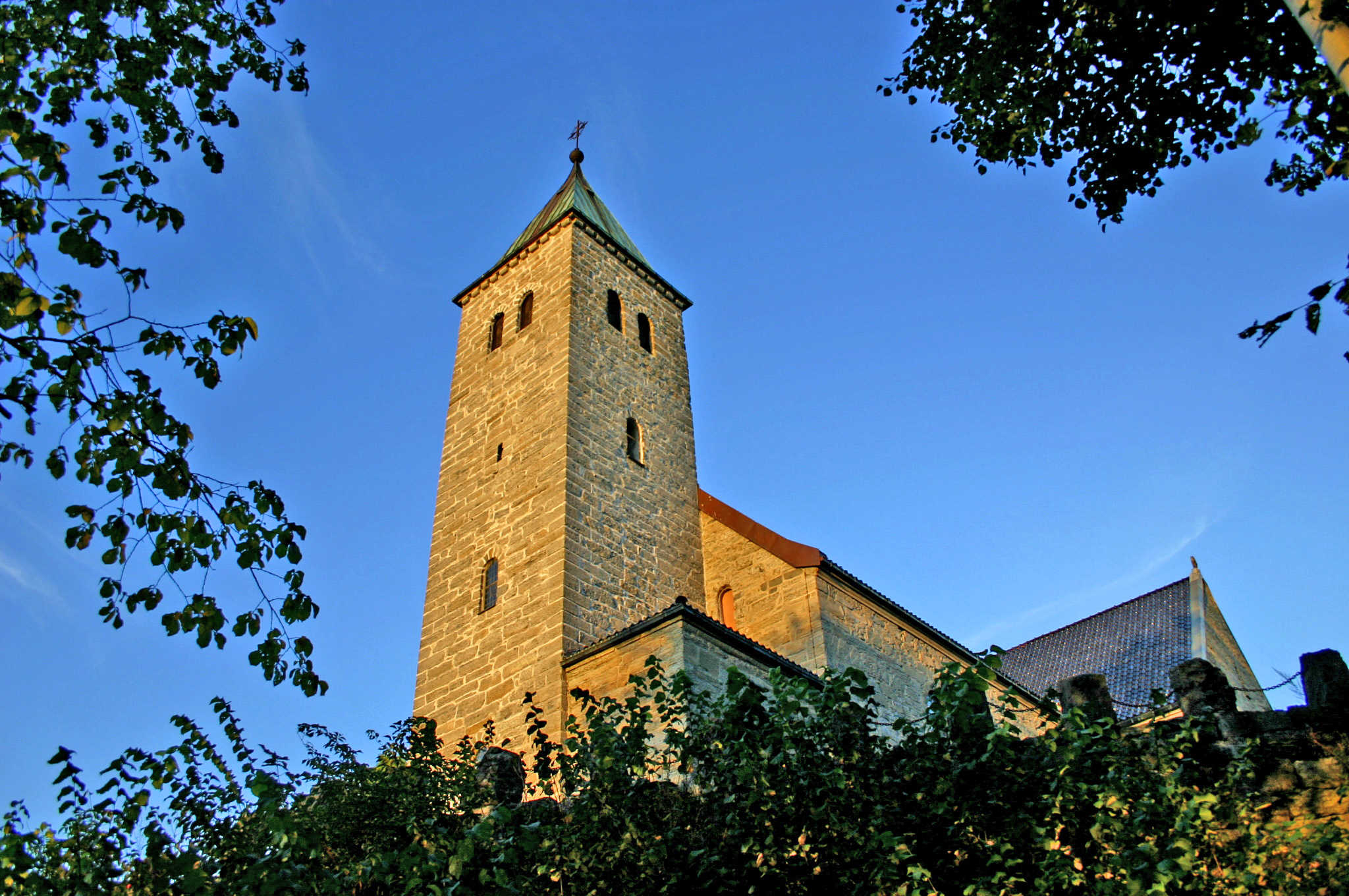 Gjerpen kyrkje